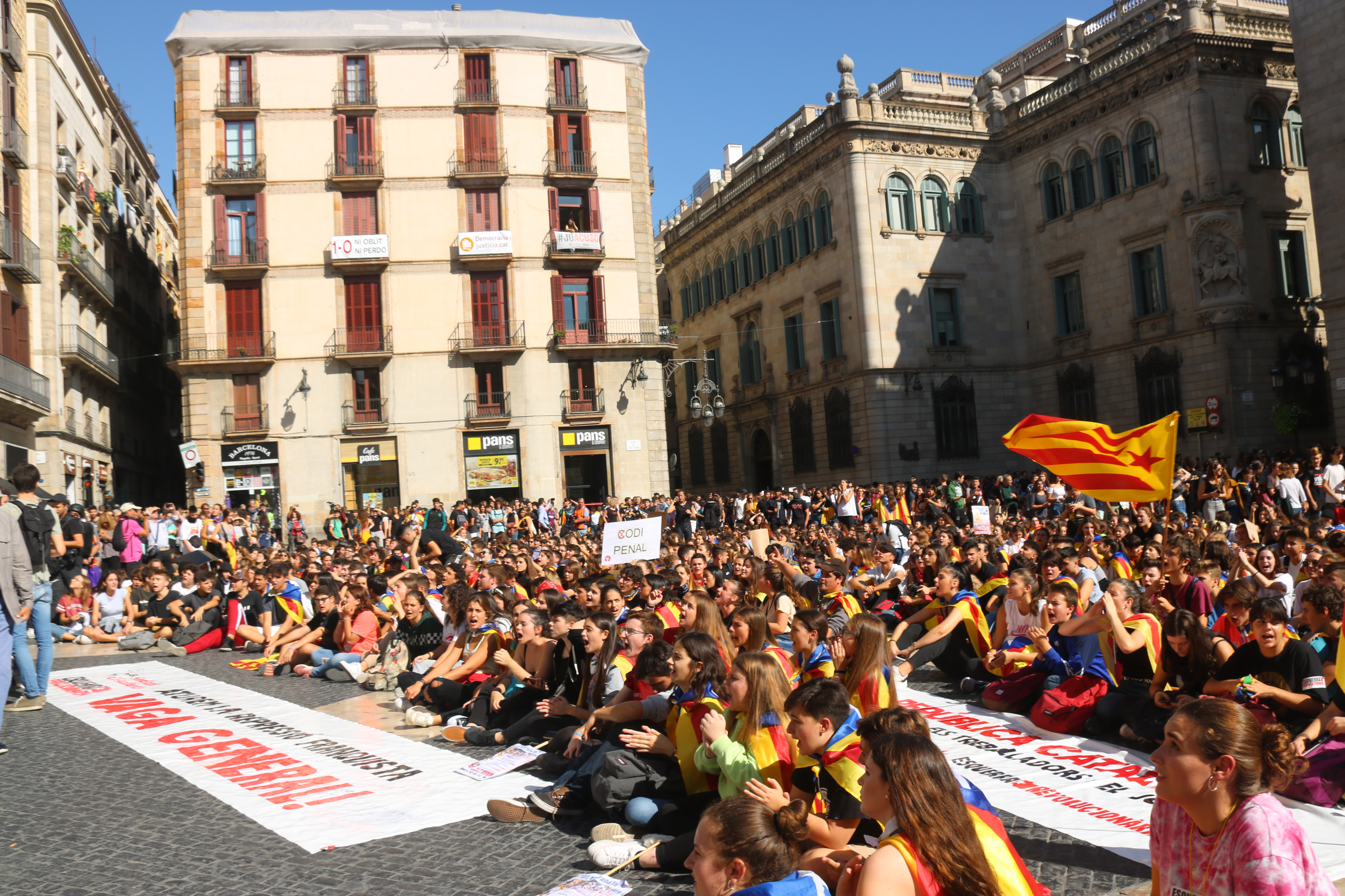 Manifestació dels estudiants contra la sentència a l'arribada a la plaça Sant Jaume de Barcelona.